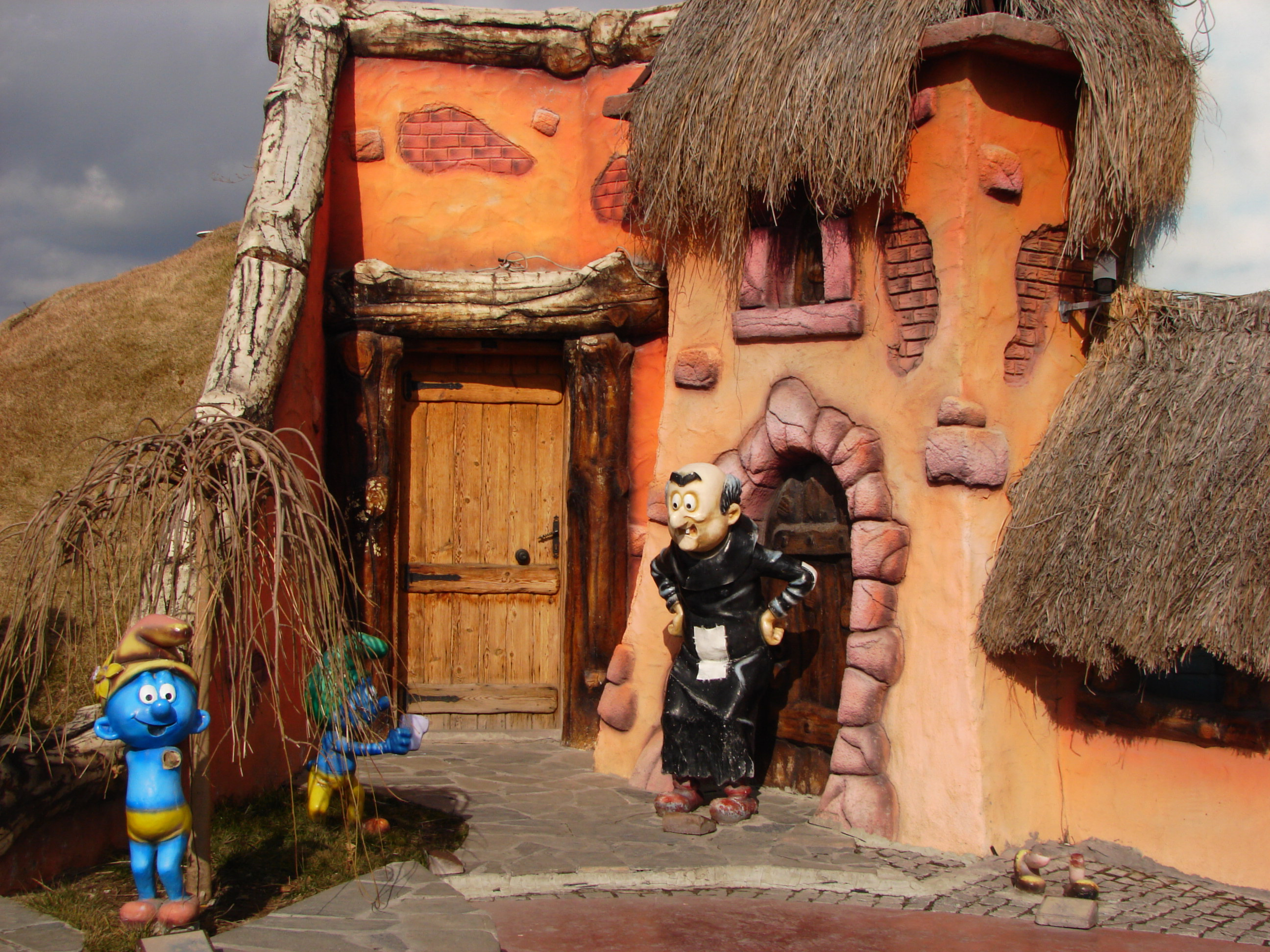 Ankara Amusement Park